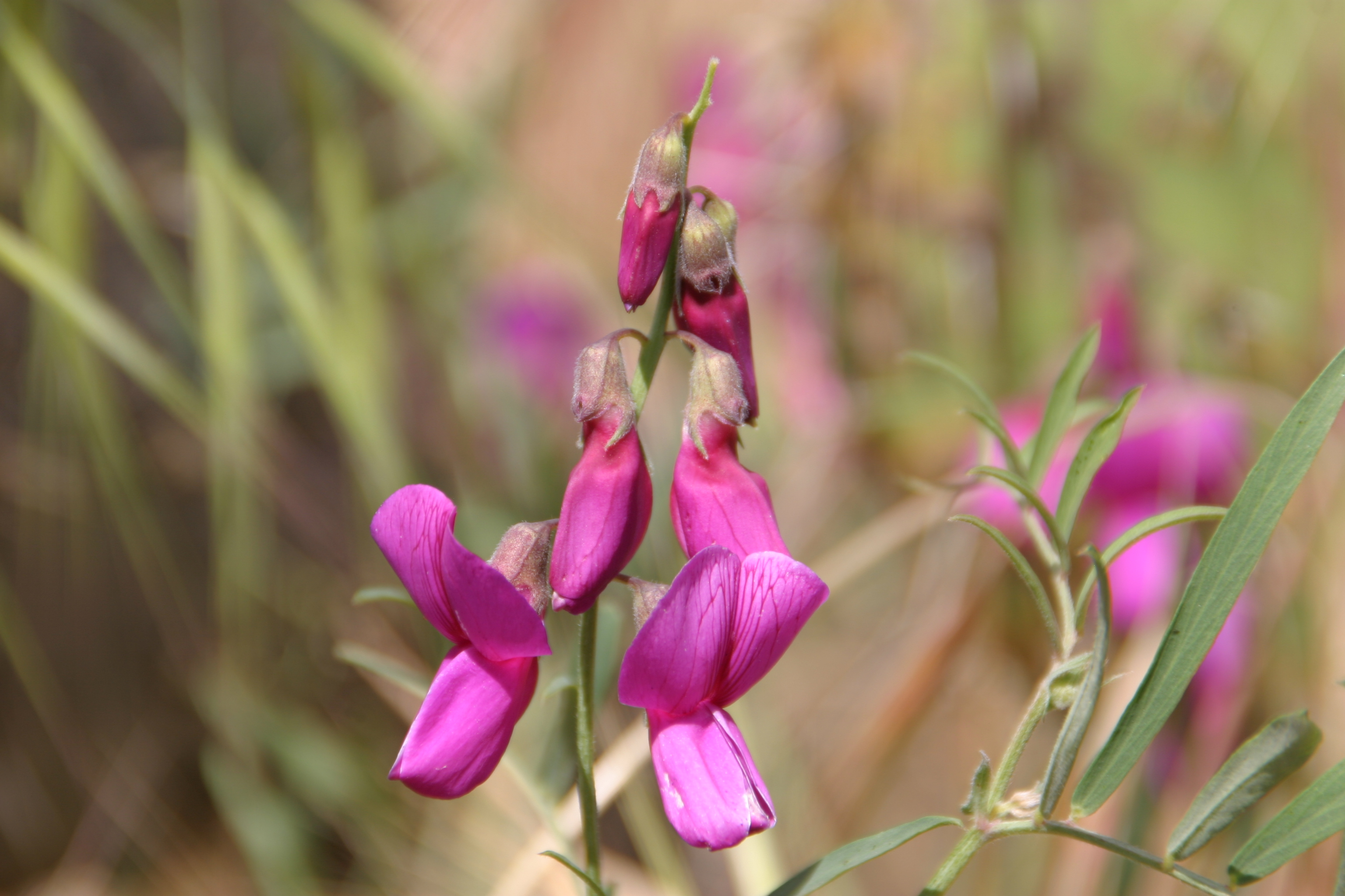 Lathyrus vestitus var. alefeldii (San Diego sweet pea)